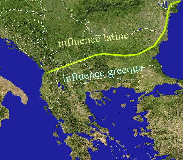 zones d'influence latine et grecque dans les Balkans durant l'empire romain